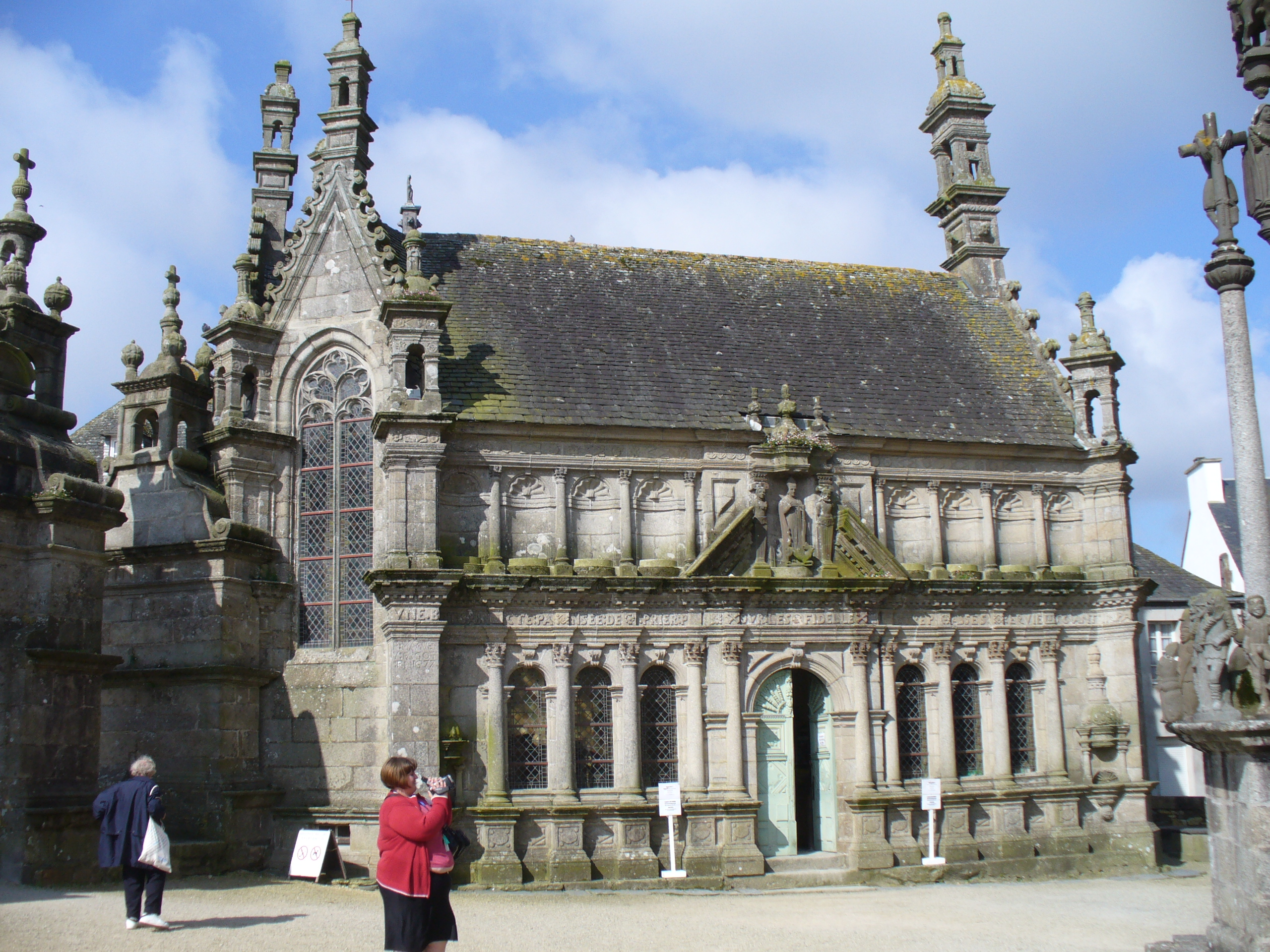 Das zweigeschossige Beinhaus(ossuaire) von St.Thegonnec in dessen Krypta eine Darstellung des Heiligen Grabes zu sehen ist stellt einen Höhepunkt bretonischer Kunst der Renaissance dar